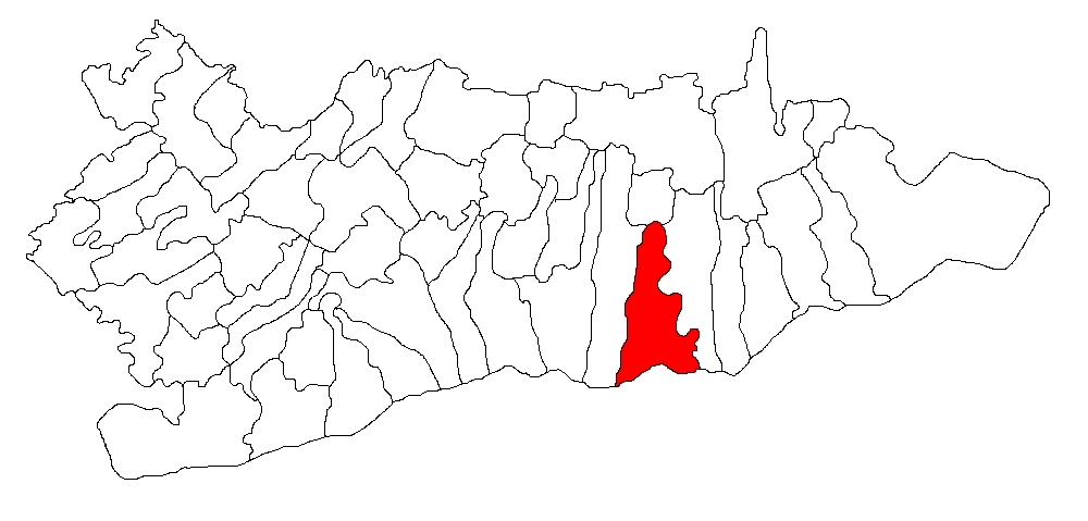 Categorie:Hărţi ale judeţului Călăraşi